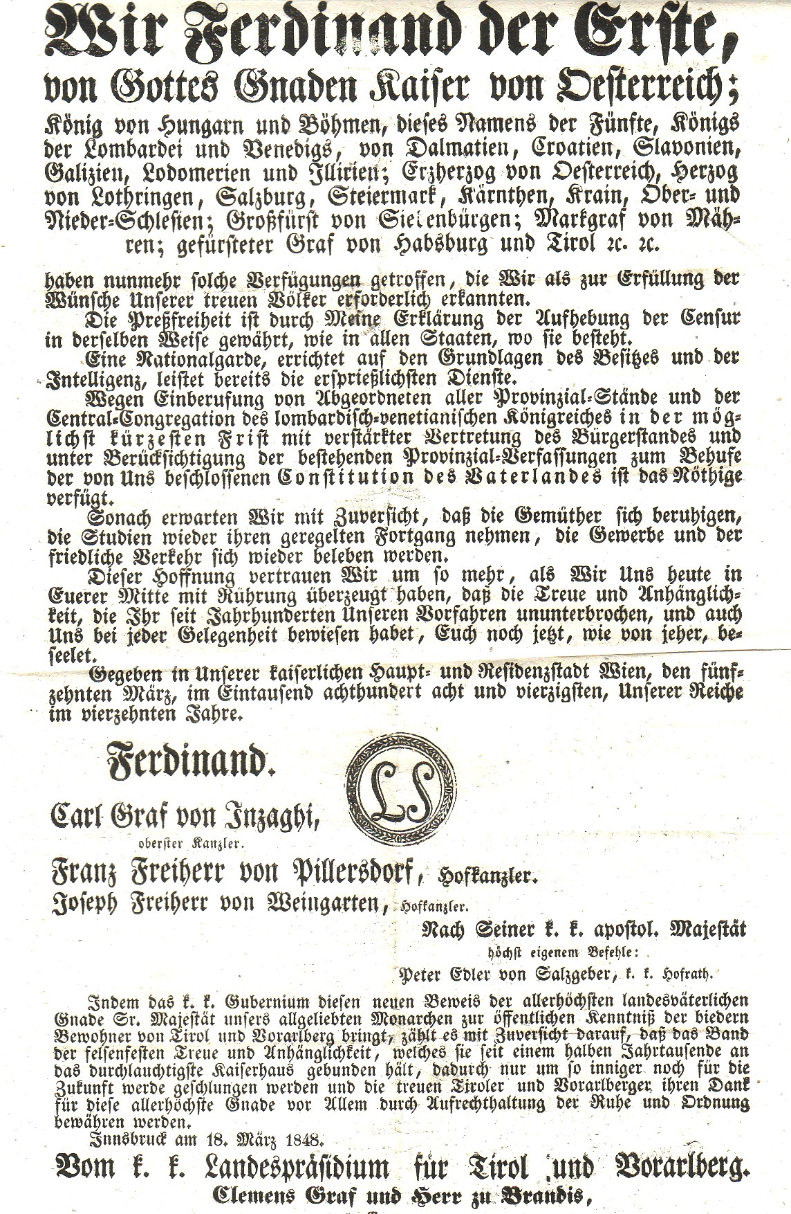 Motiv: Aufhebung der Pressezensur durch Ferdinand I. am 15.3.1848, herausgegeben am 18. März 1848 in Innsbruck Quelle: aus der Sammlung von Benutzer:Henryart Scan: von Benutzer:Henryart Datum : 29.12.2004